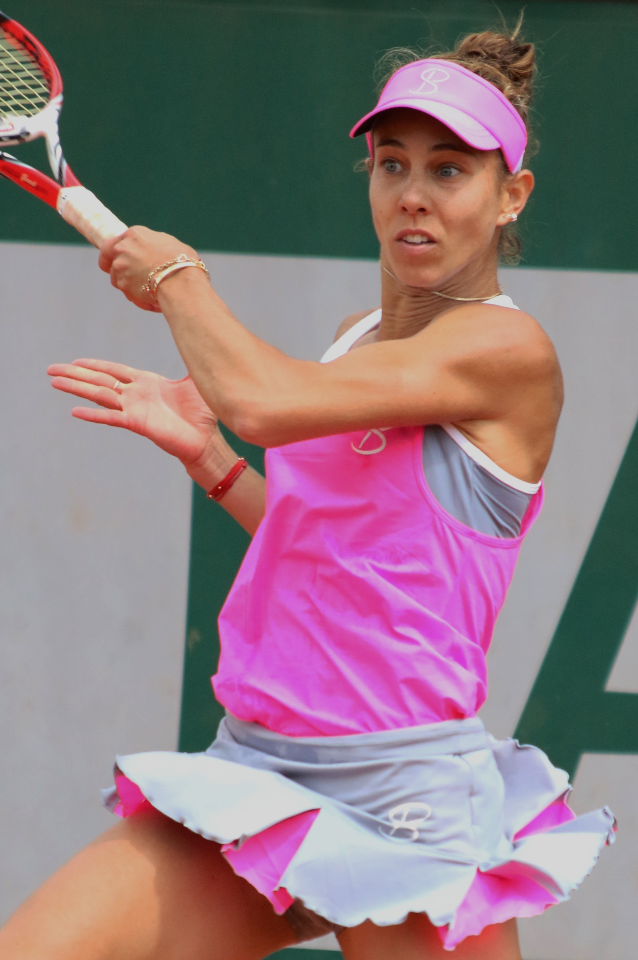 Buzarnescu RG18 (22)